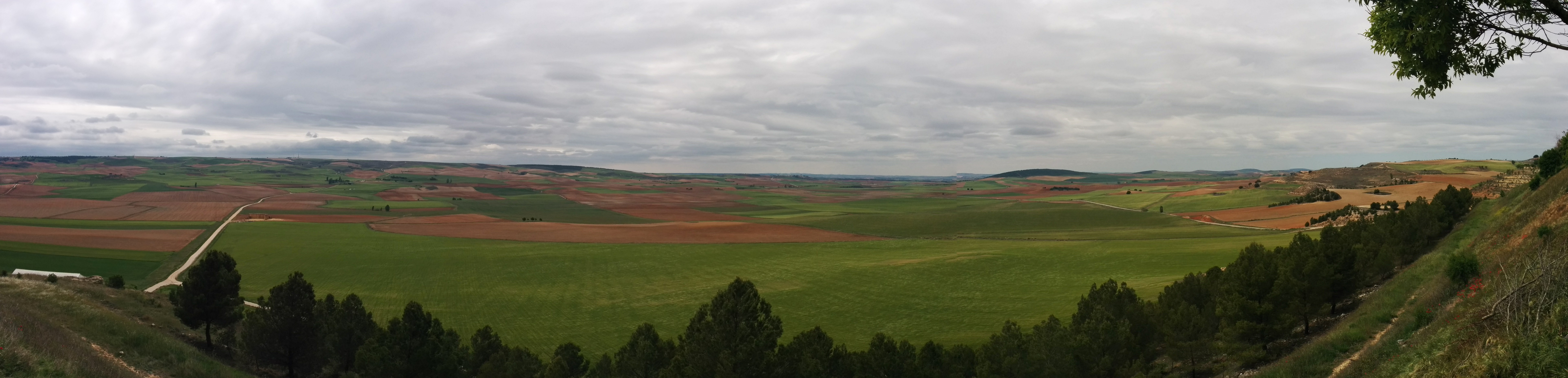 Panorámica desde La Hinojosa (Cuenca, España).